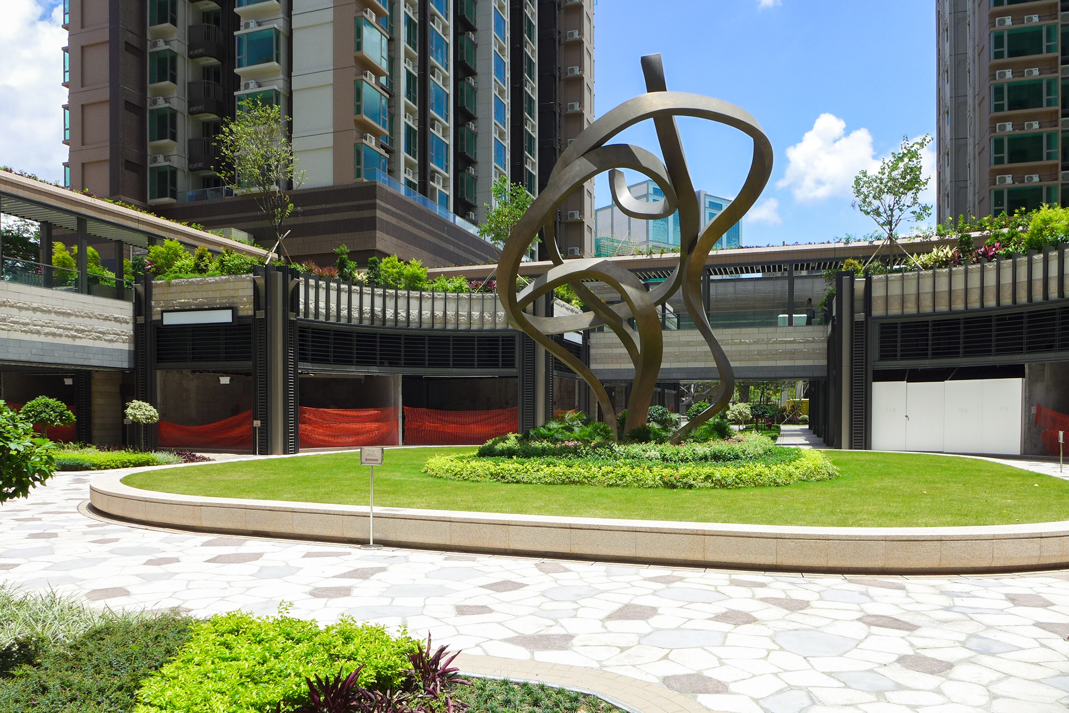 Yuccie Square GF sculpture